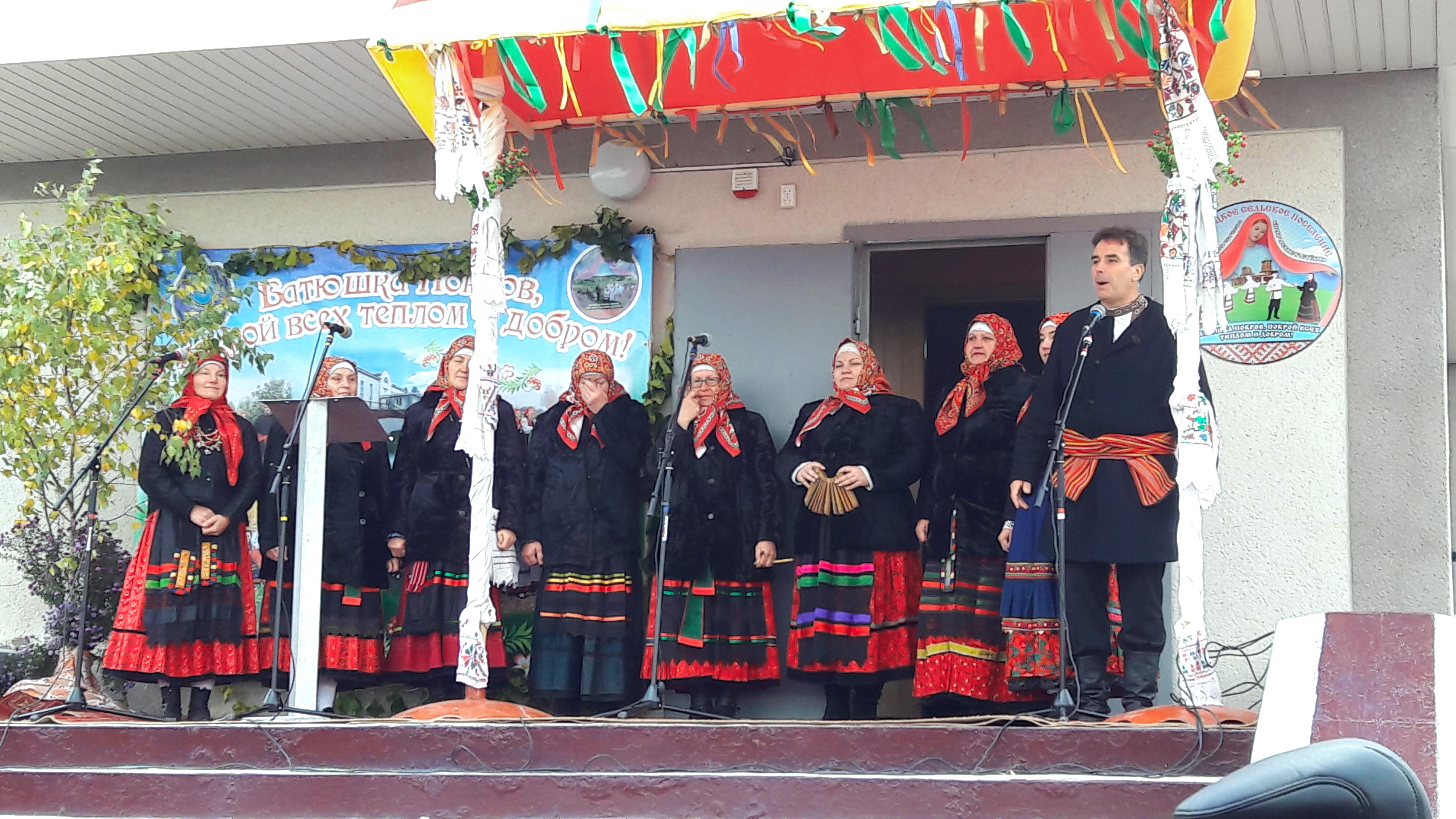 Престольный праздник в селе Тростенец. Традиционный костюм села Тростенец (Новооскольский район Белгородской области).